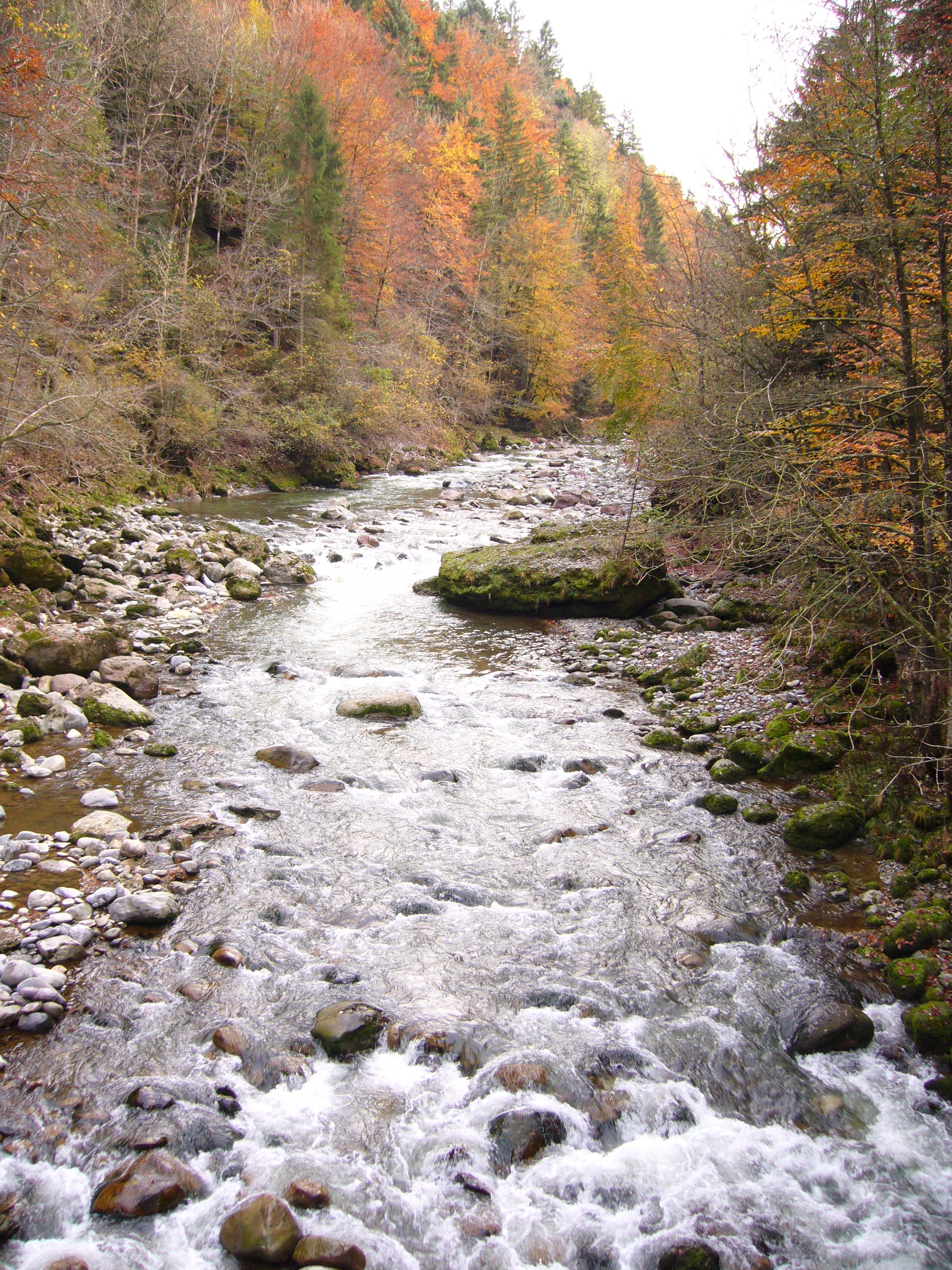 Sihl beim Sihlsprung. Blick flussaufwärts.